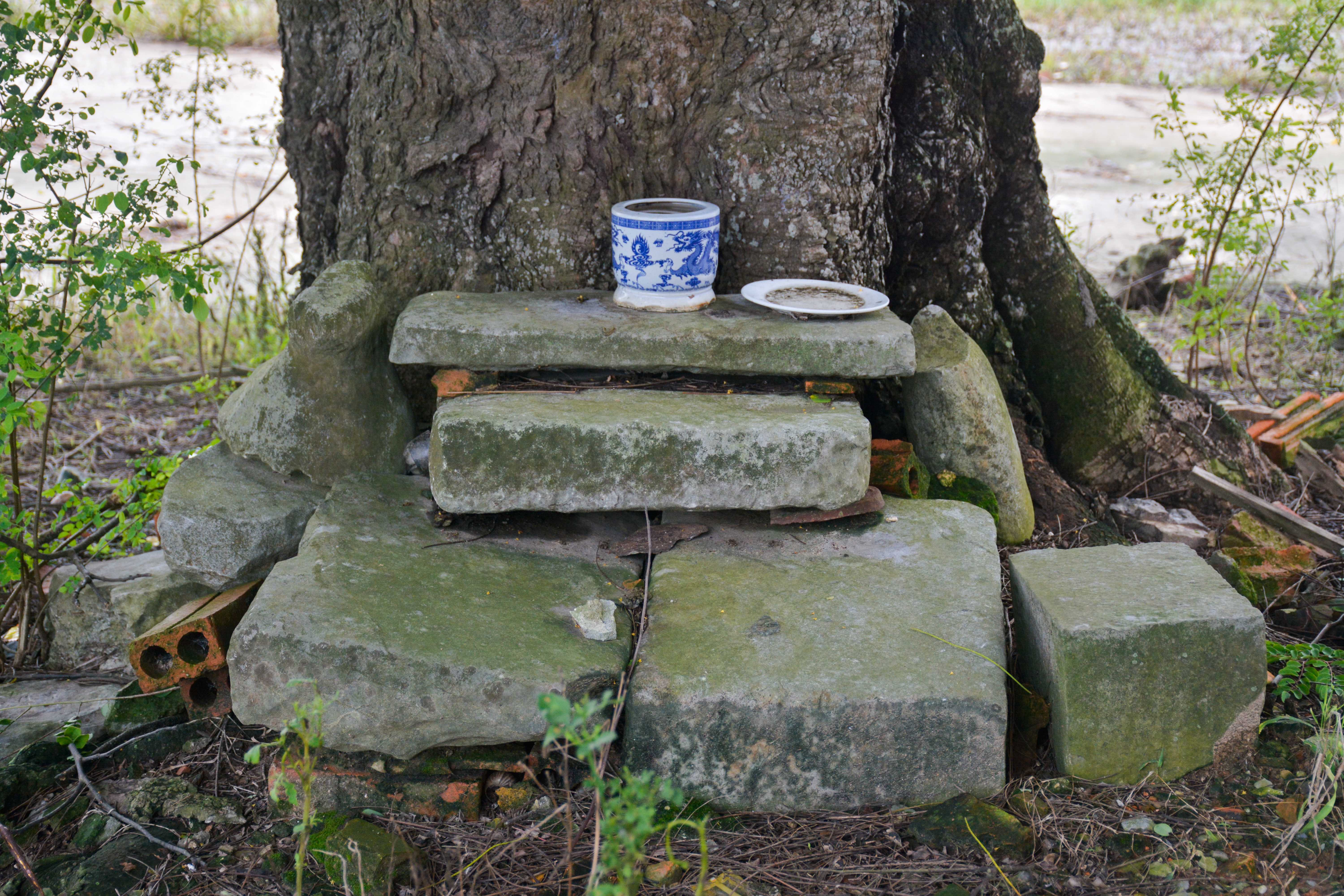 Những phiến đá của miếu cũ còn sót lại đến ngày nay